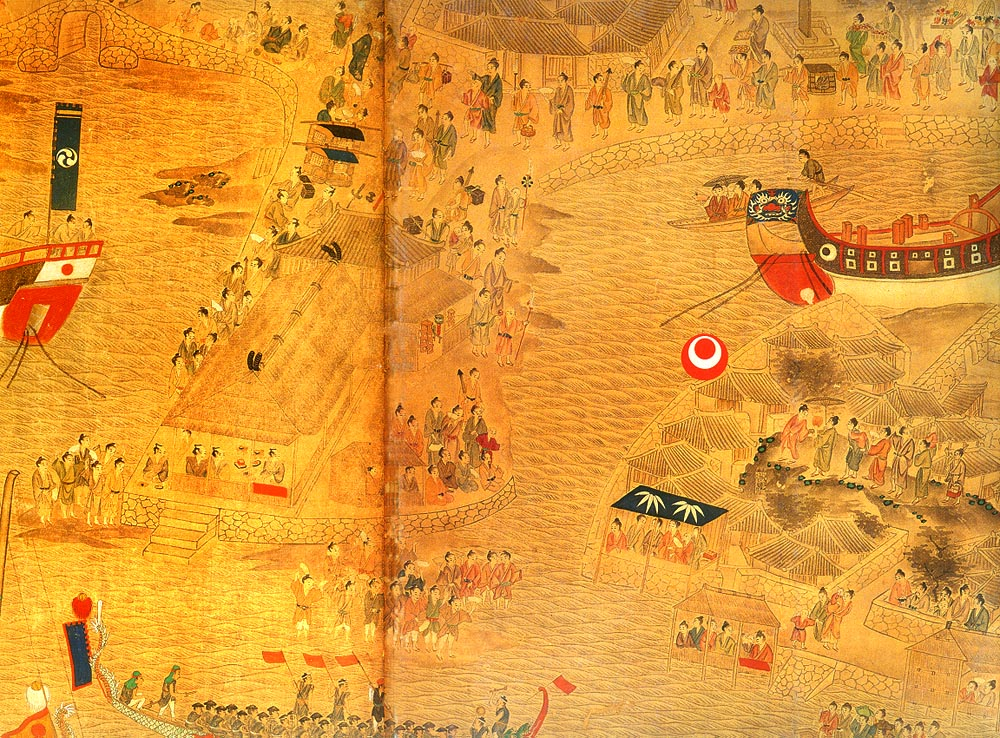 琉球那霸城